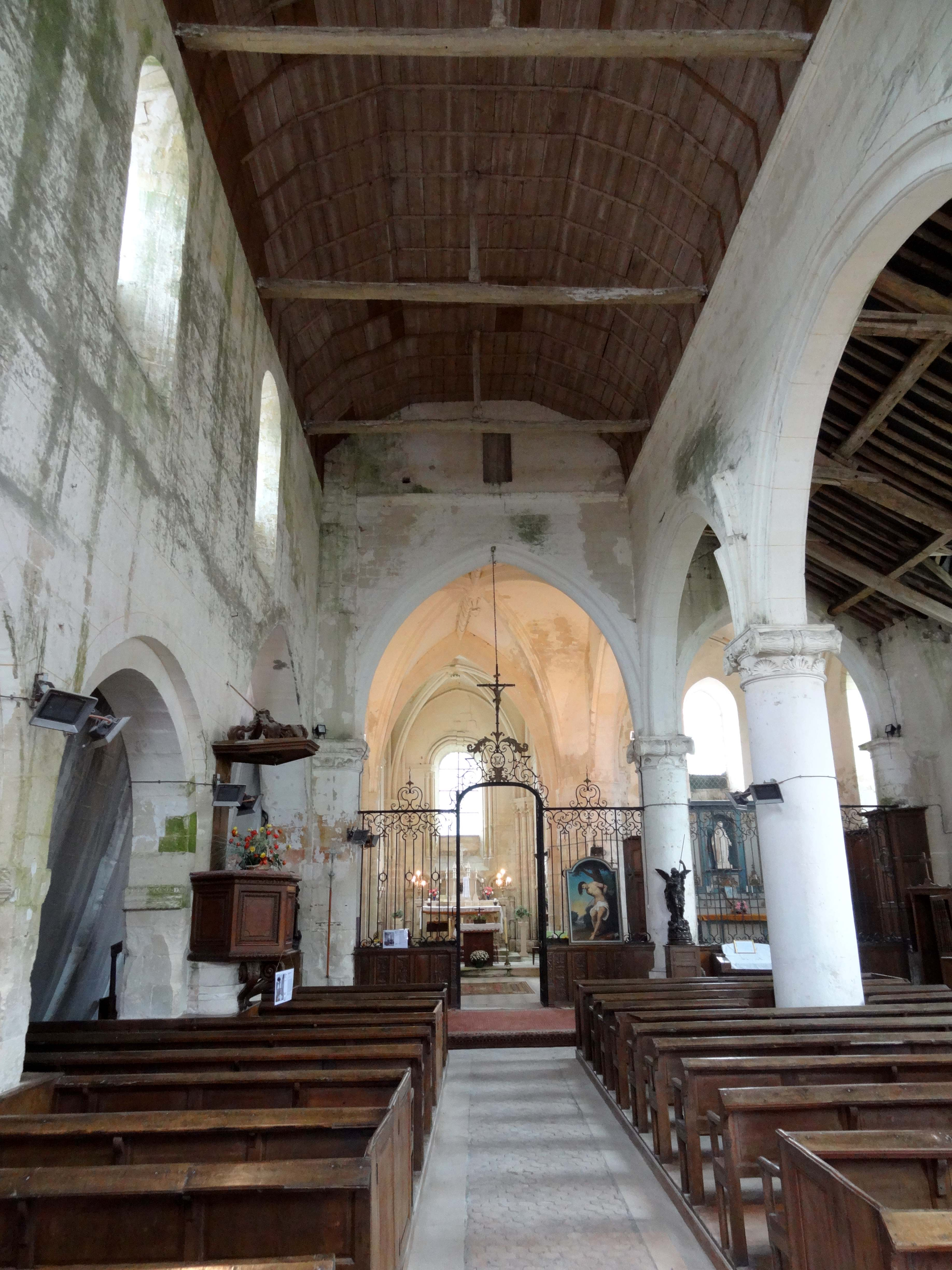 Intérieur de l'église - voir titre.